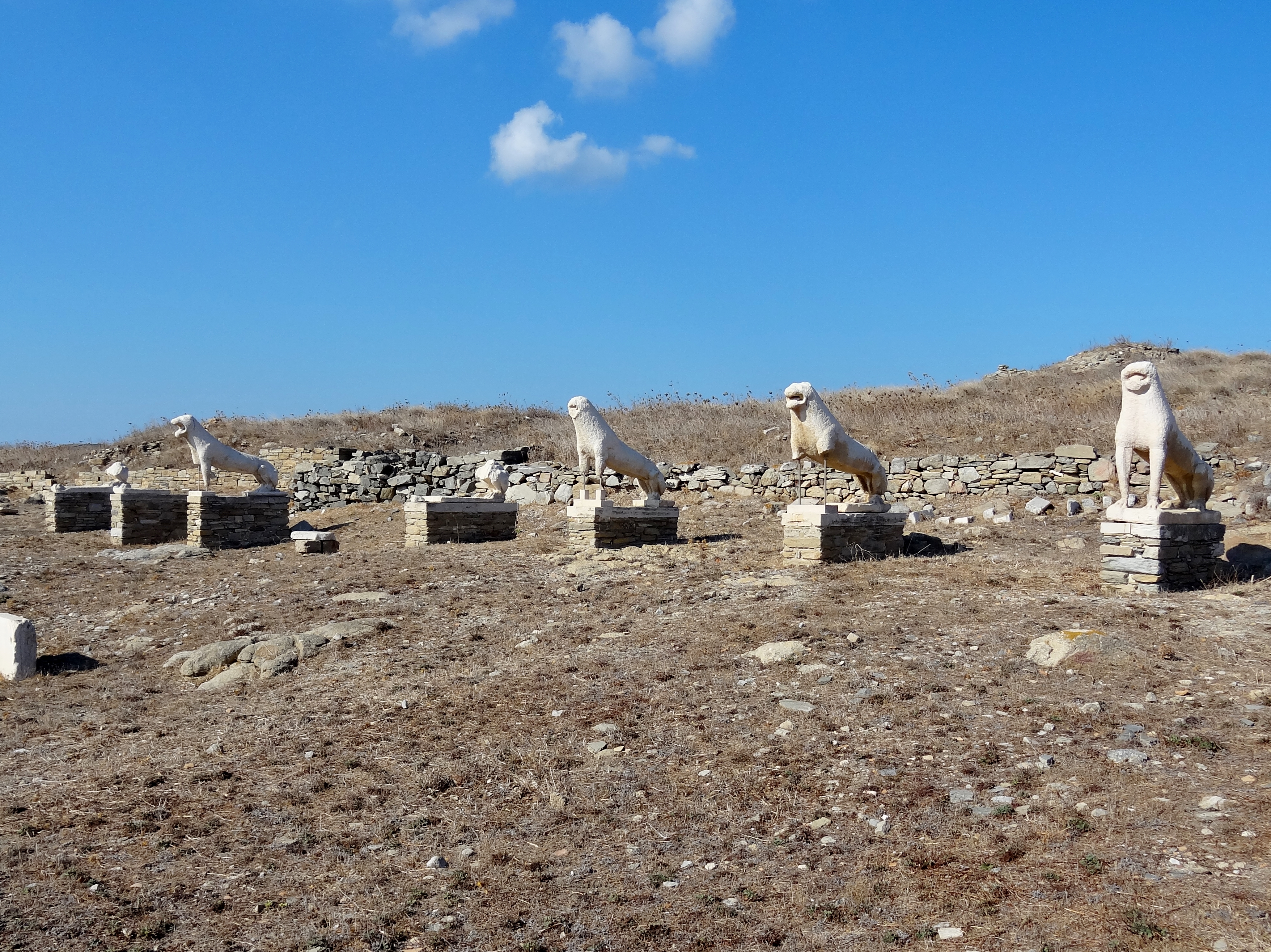 Löwenterrasse der Ausgrabungsstätte von Delos, Kykladen, Griechenland